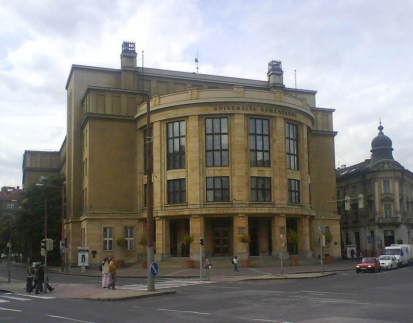 Univerzita Komenského